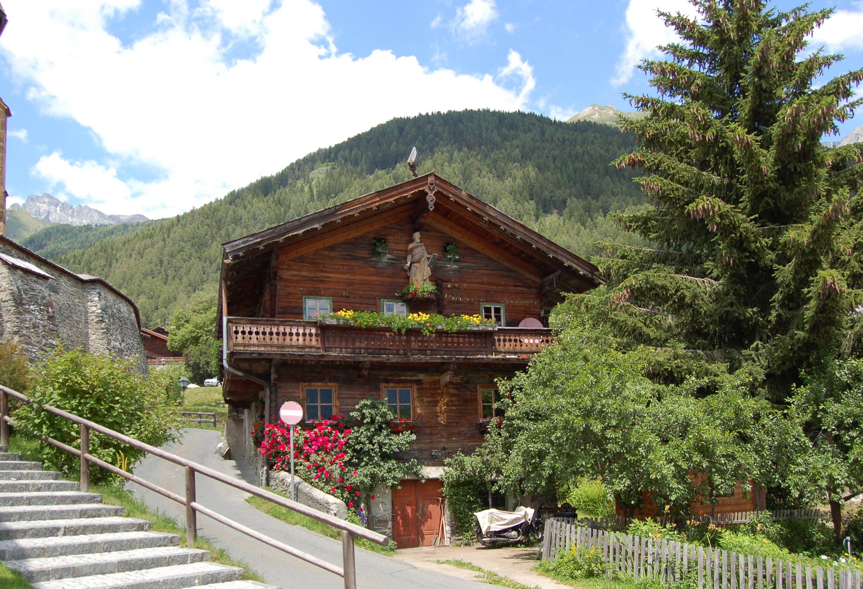 Der denkmalgeschützte Bauernhof Innerschmieder in Obermauern (Gemeinde Virgen im Bezirk Lienz).